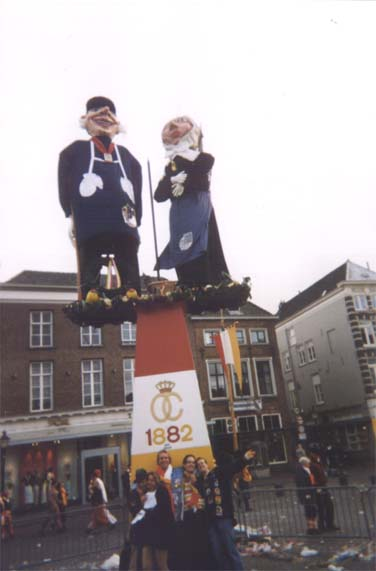 Foto van Knillis en Hendrien, de carnavalssymbolen van Oeteldonk. Zelf gemaakt in 2004 en ingescand.